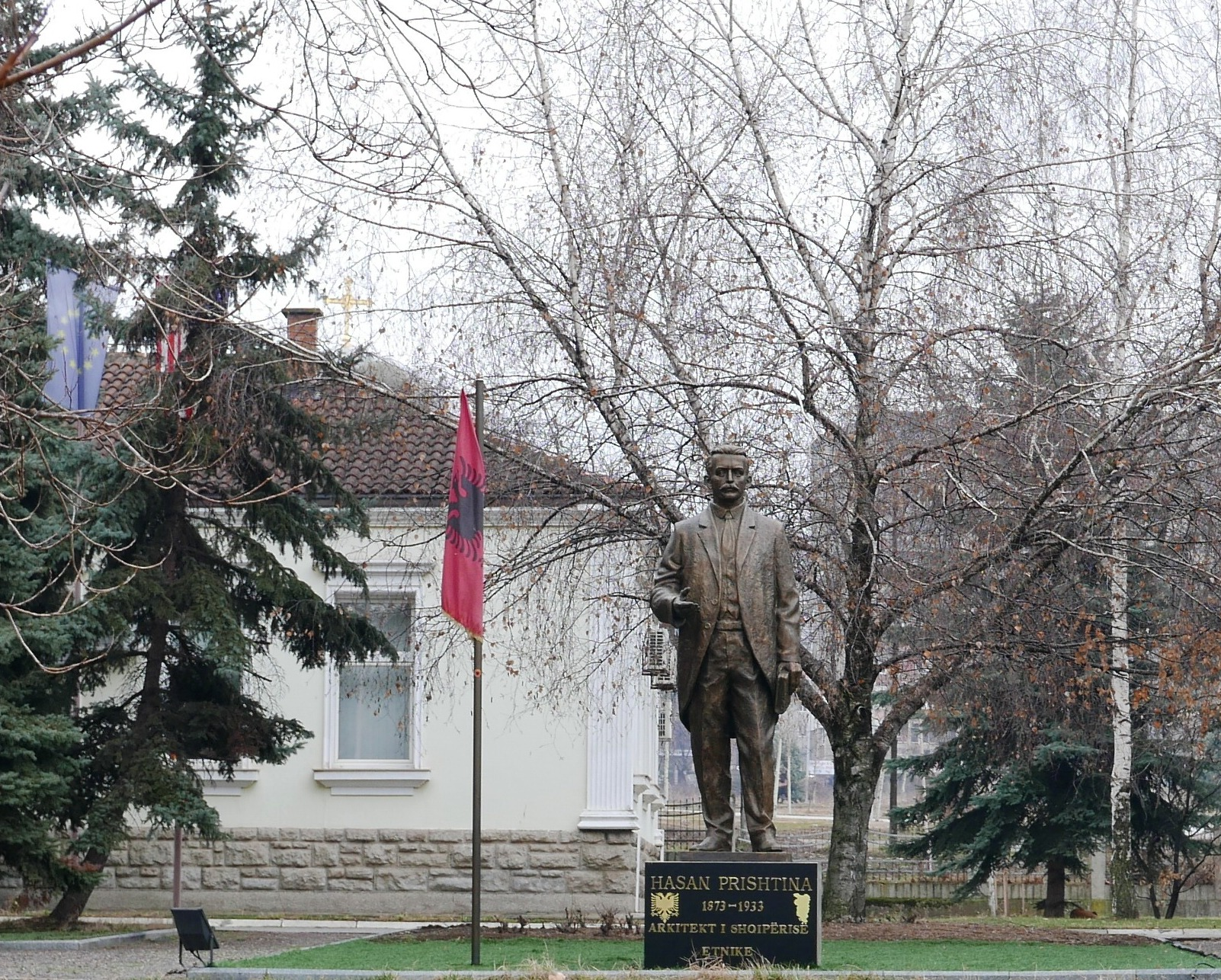 Shtatorja e Hasan Prishtinës , pran Rektoratit të Universitetit " Hasan Prishtina " në Prishtinë